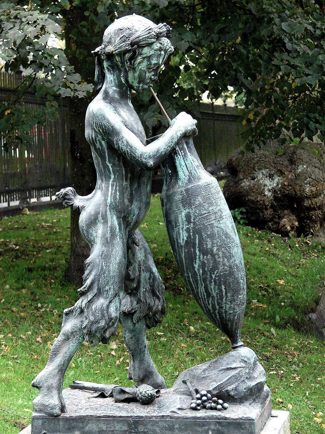 Vinsugende satyrdreng, Louis Hasselriis, 1888, København